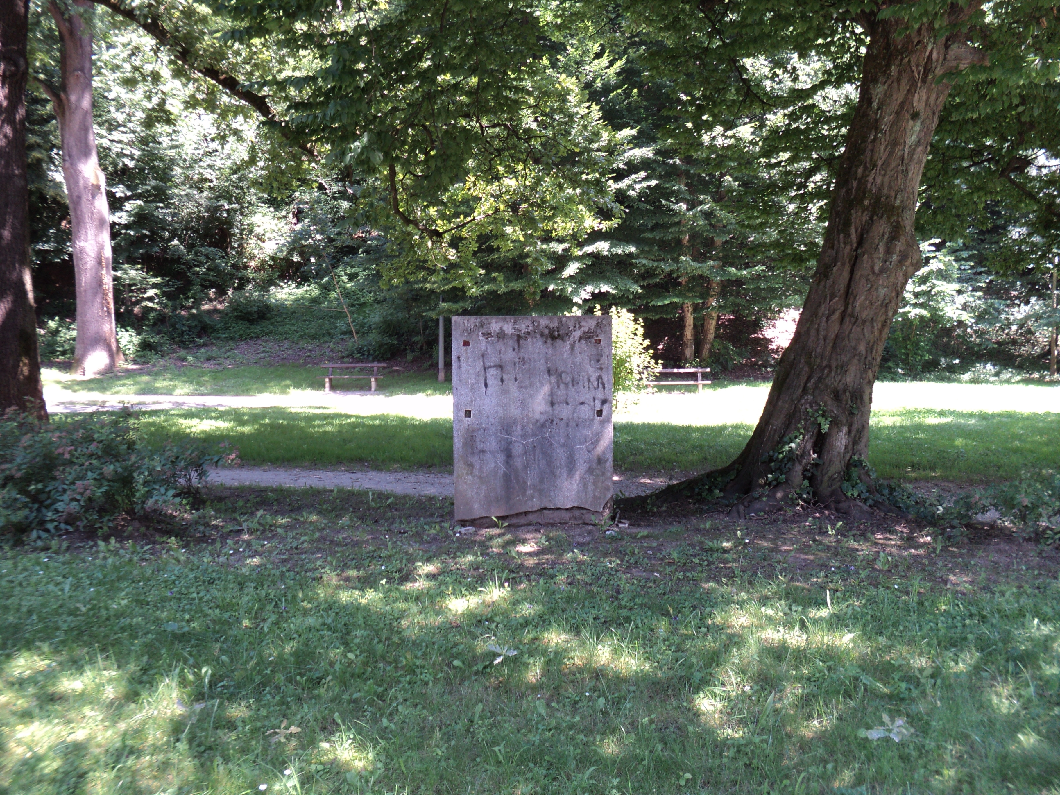 Lokacija u Zelengaju, gdje su u okršaju s policijom poginuli sekretari SKOJ-a, Pero Popović Aga i Josip Kolumbo 1930. godine.